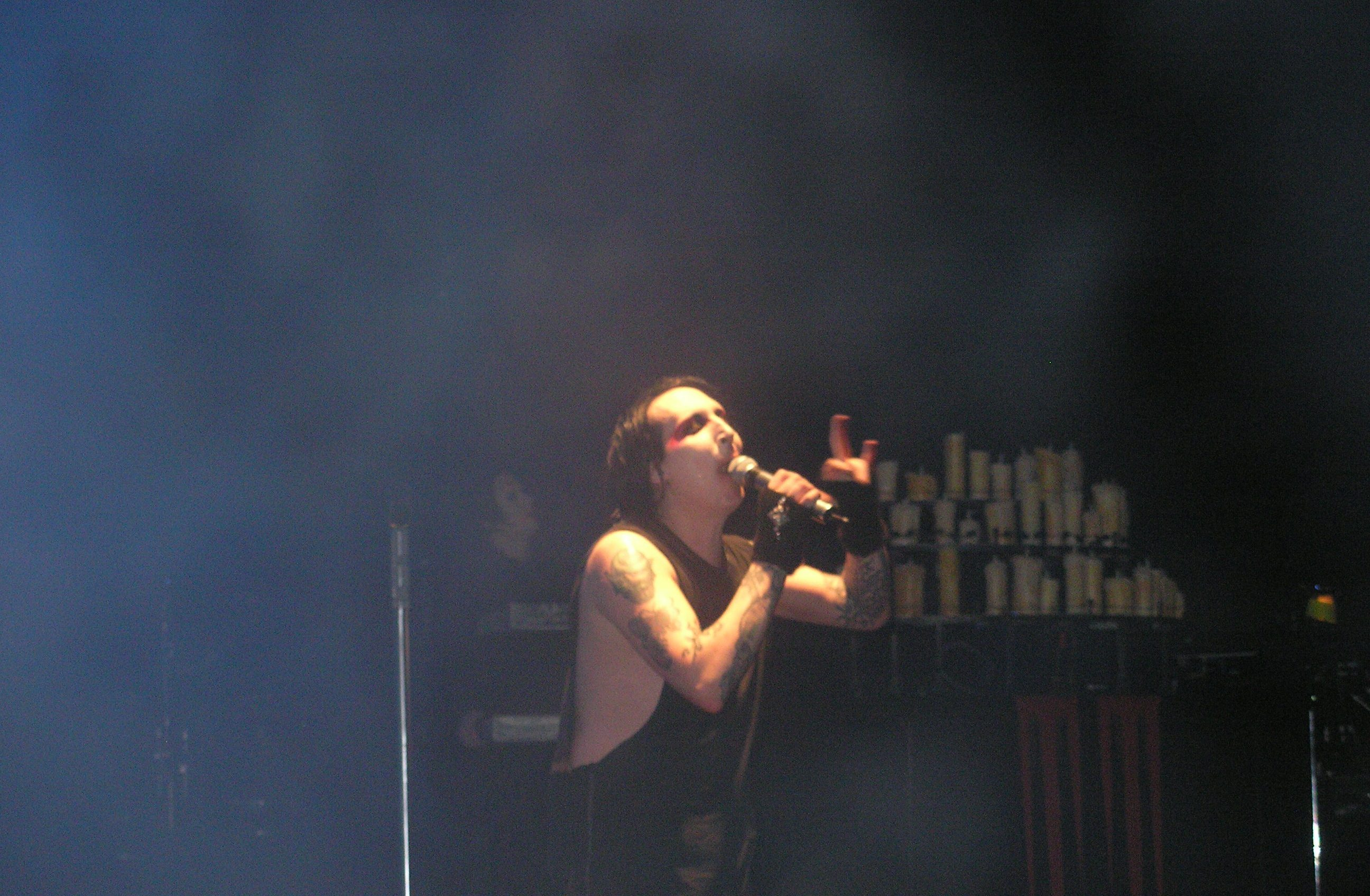 Marilyn Manson live in Ljubljana, Slovenia